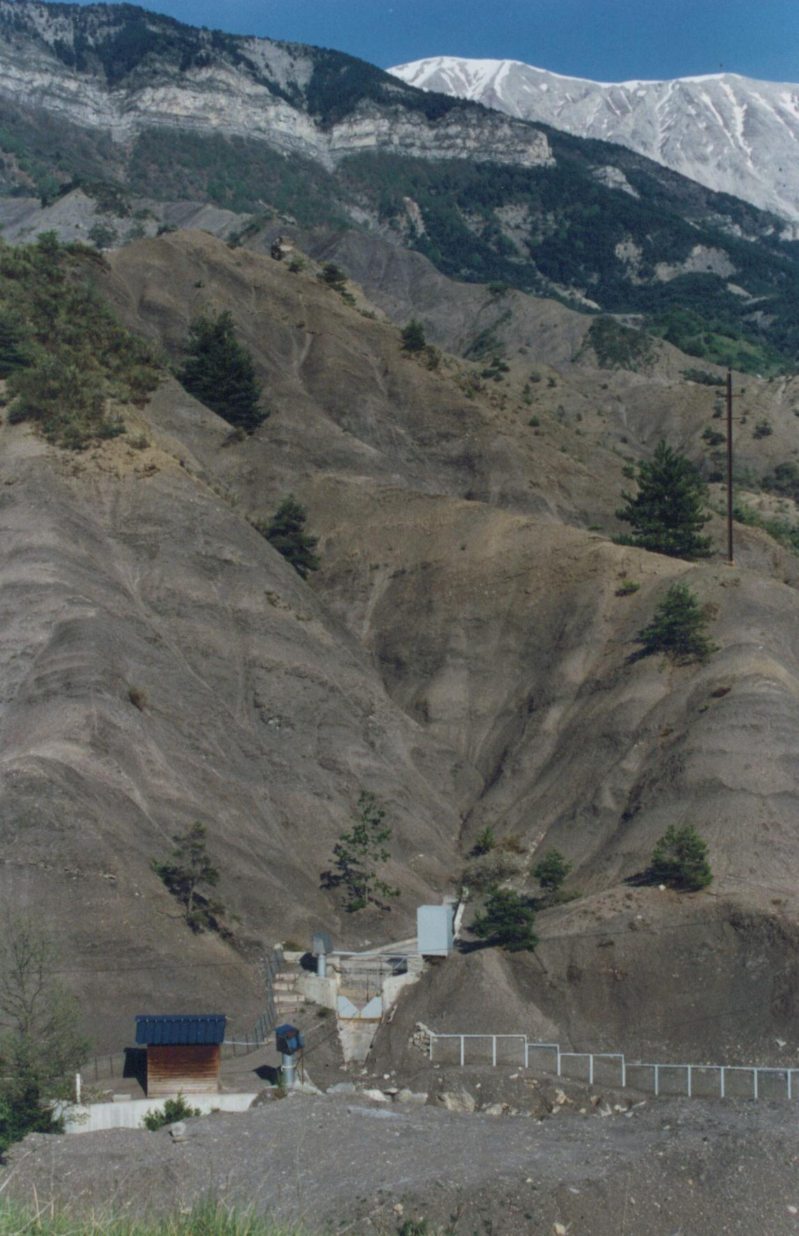 ORE Draix suivi érosion et crue torrentielle